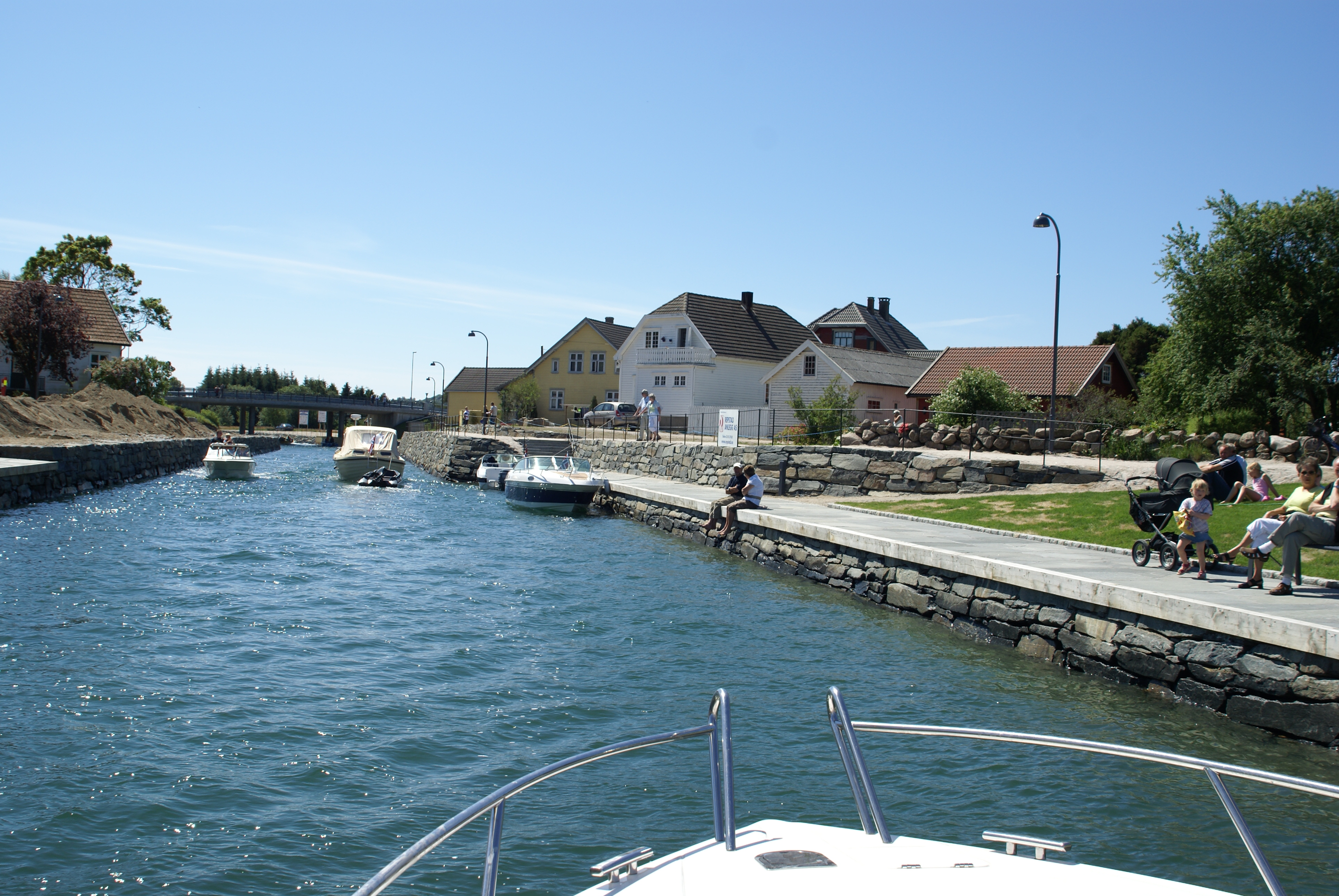 Dronningbrygga langs Spangereidkanalen